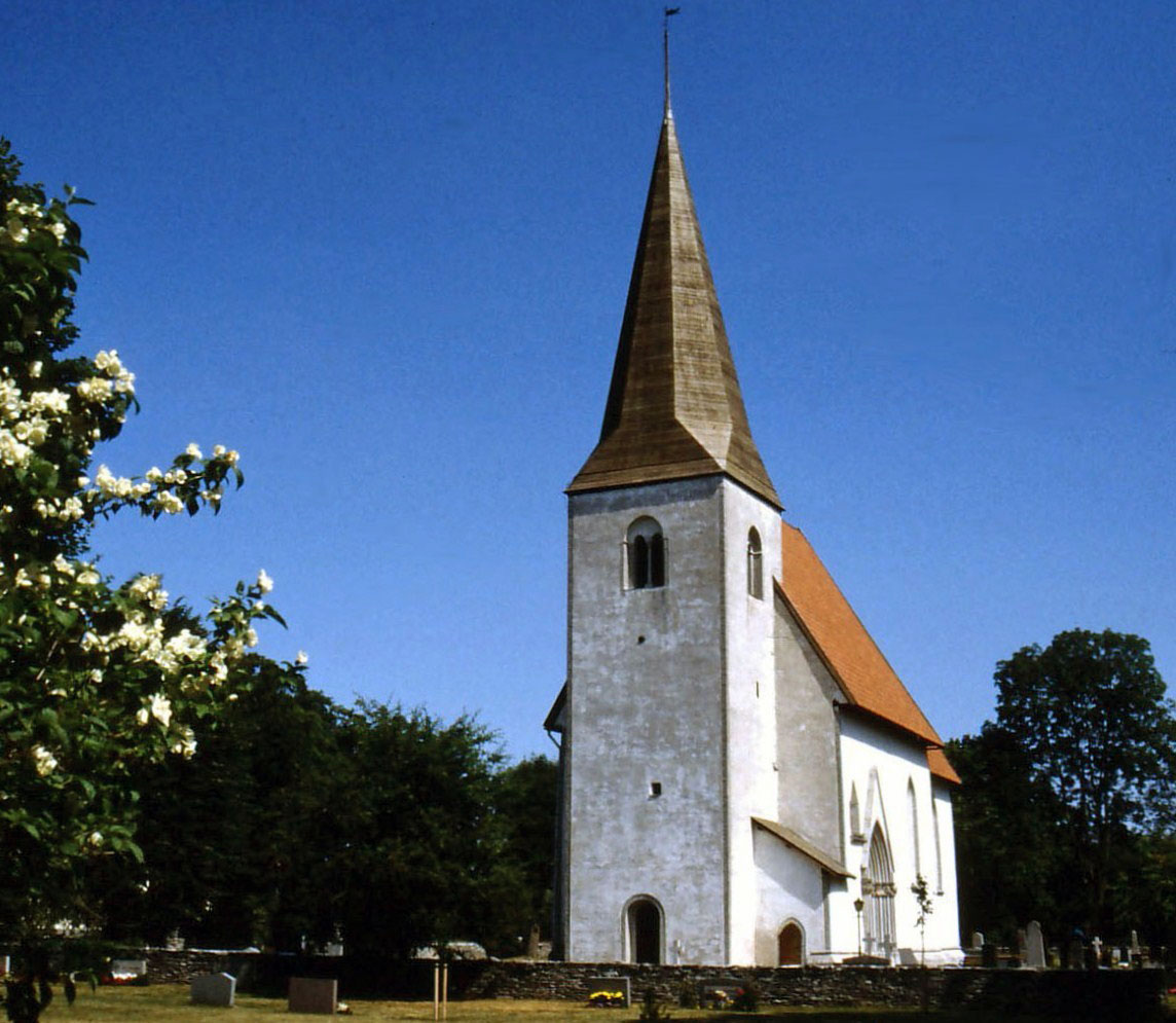 Martebo kyrka.